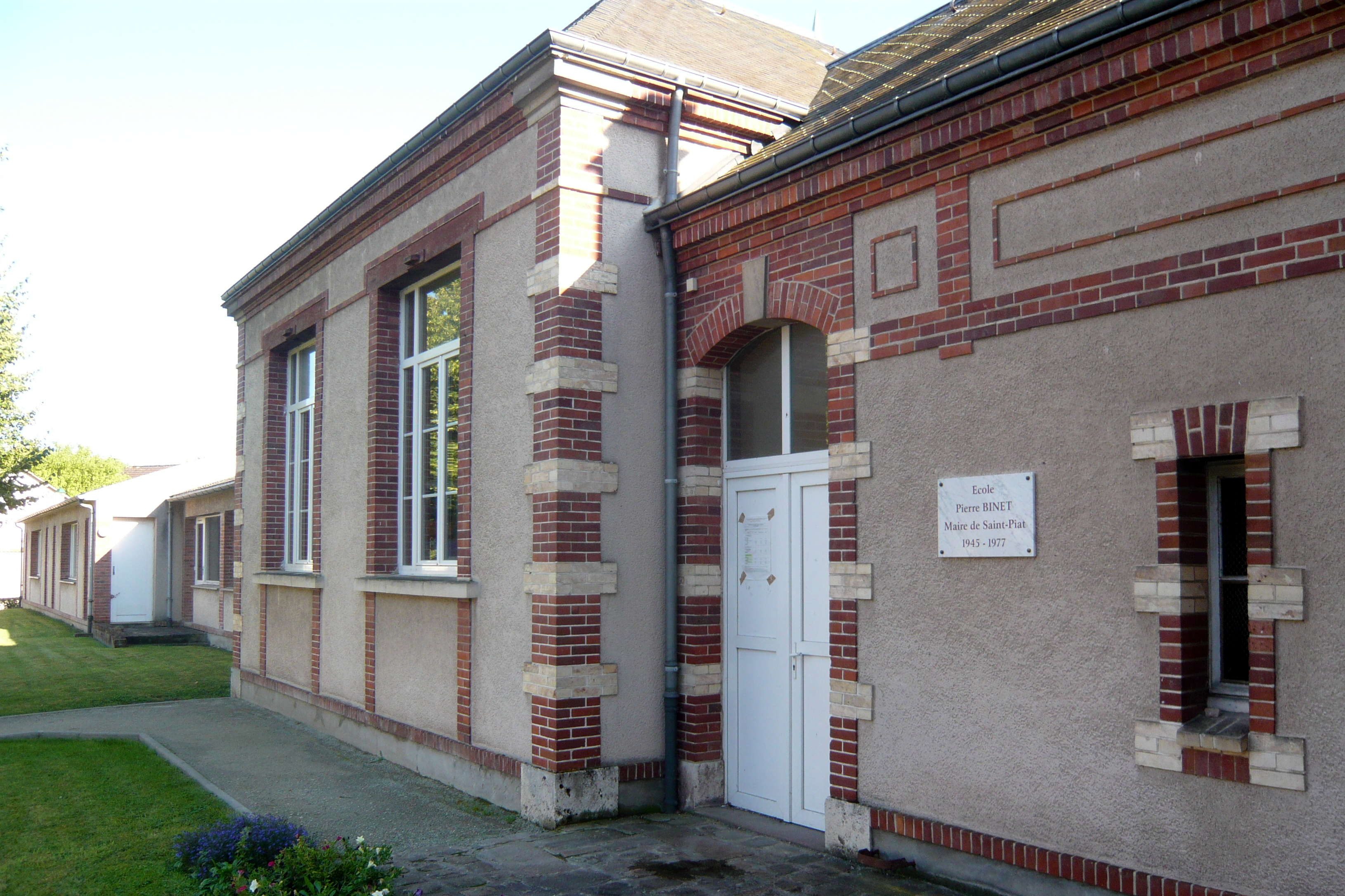 École Pierre Binet, Saint-Piat, Eure-et-Loir (France). Maire de Saint-Piat de 1945 à 1977.